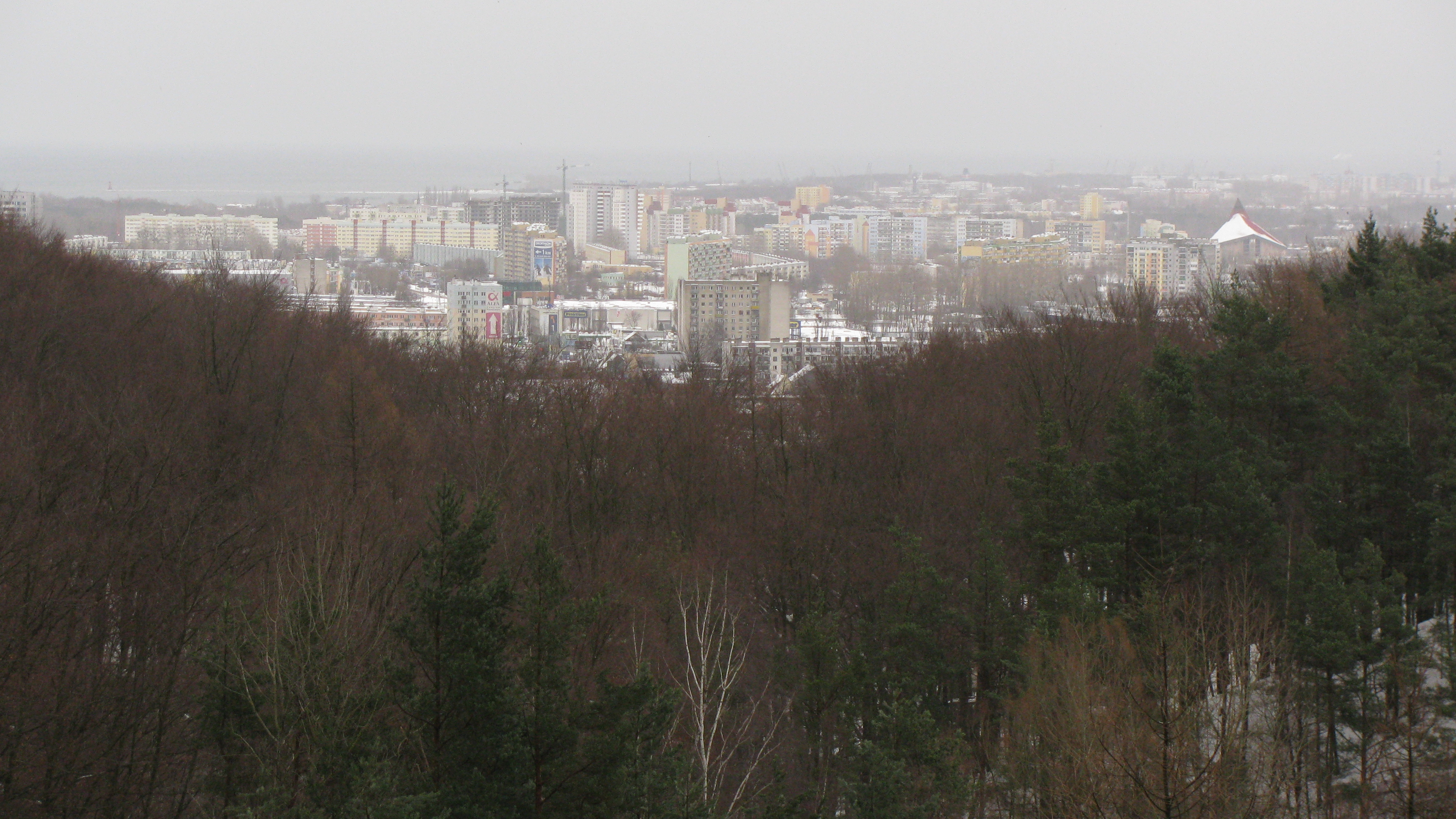 Gdańsk Przymorze - panorama z Lasów Oliwskich.